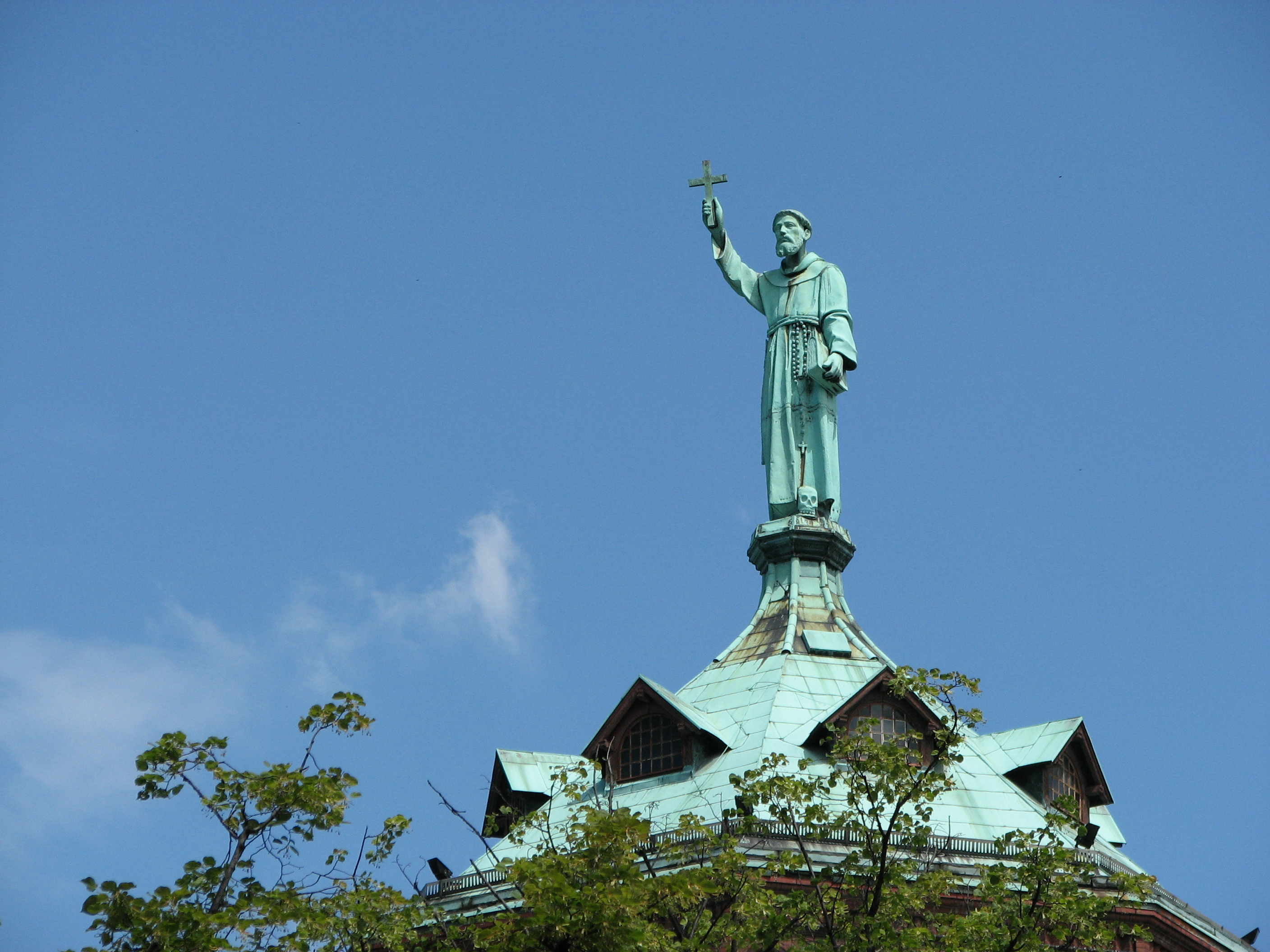 Franciscan basilica dome in Katowice Panewniki, Poland